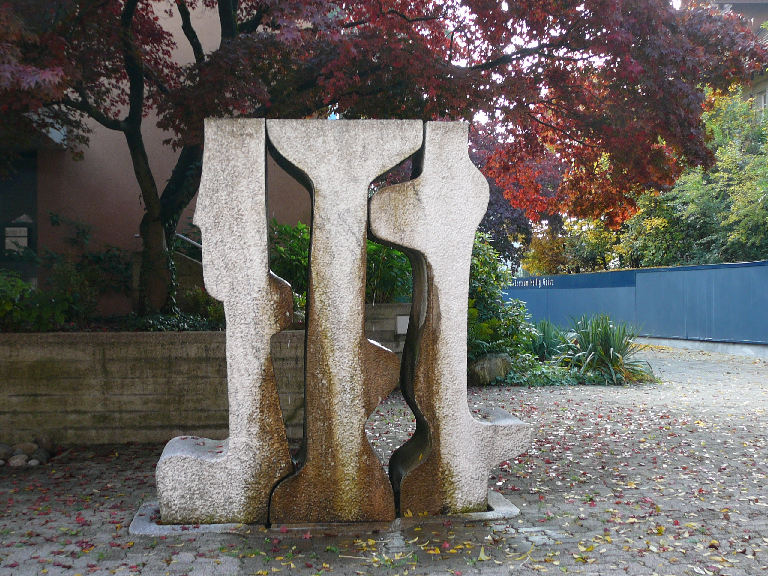 Römisch-katholische Pfarrkirche Heilig Geist Zürich-Höngg, Brunnen von Pierino Selmoni von 1973